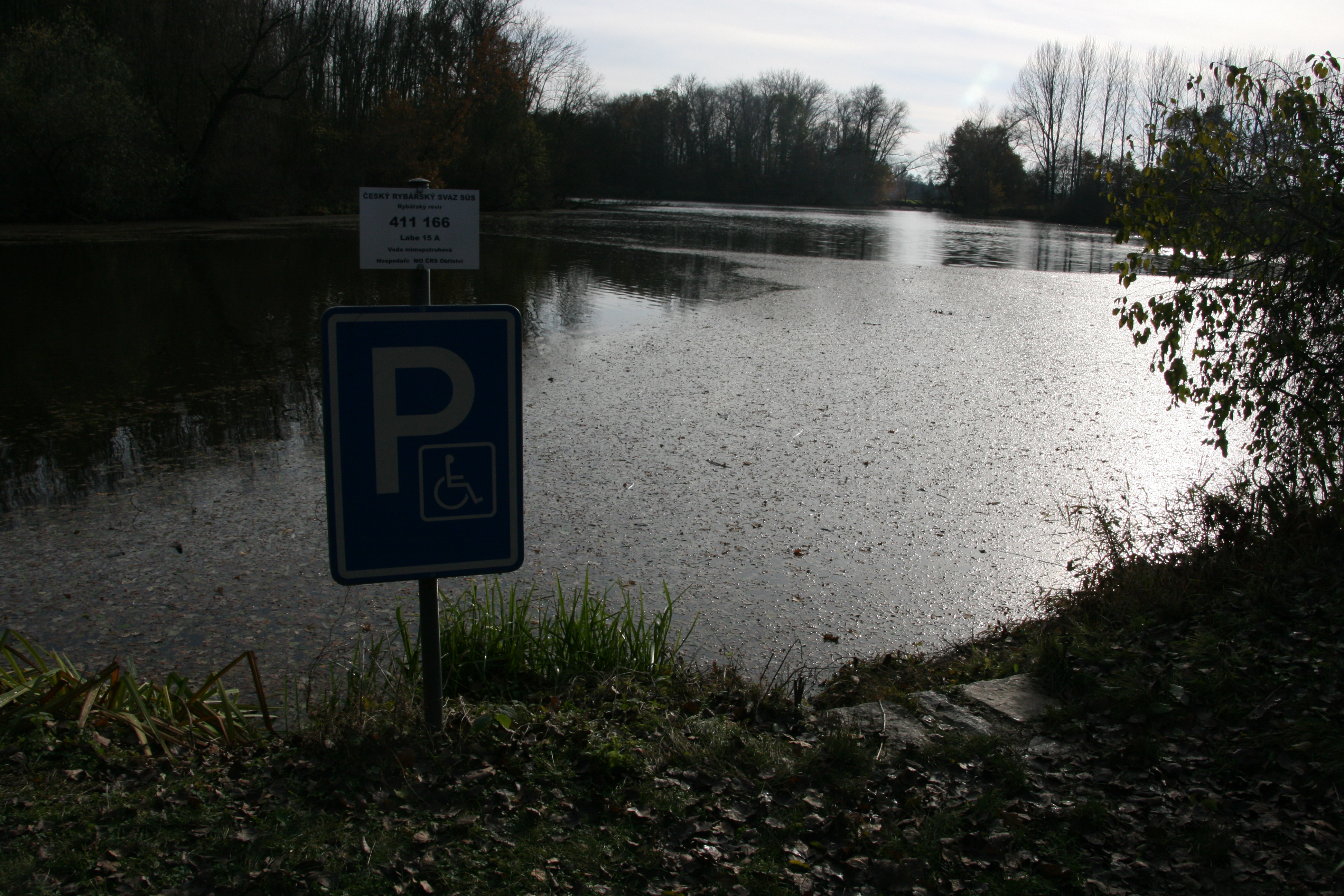 Místo pro invalidní rybáře u starého Labe